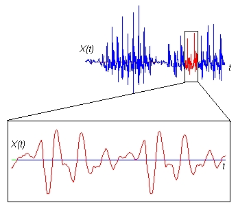 Aparato Fonador Humano